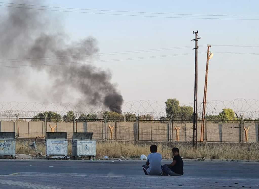 Barış Pınarı Harekâtı sonrası Kamışlı'dan yükselen dumanların Nusaybin'den görüntüsü